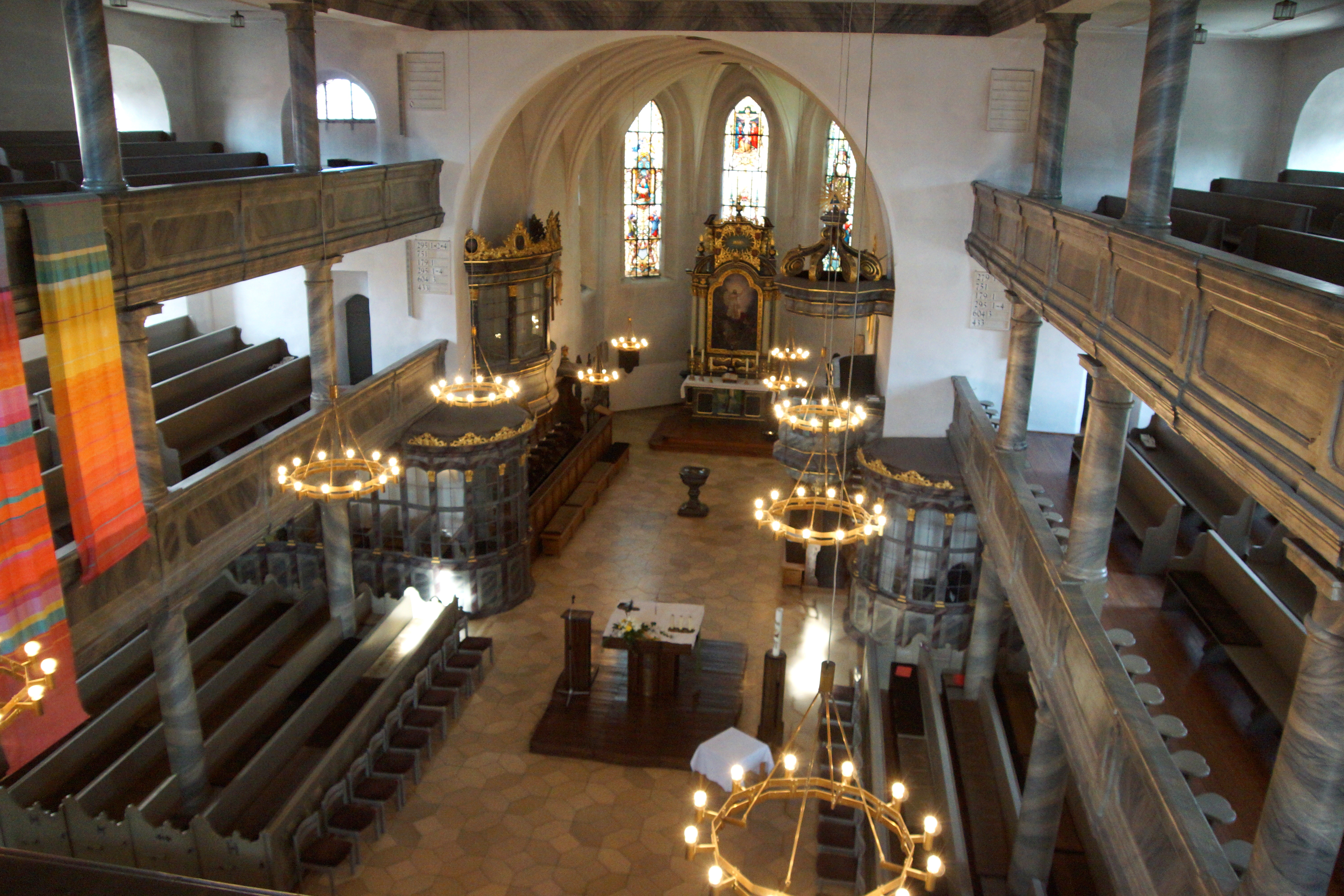 Die evangelische Pfarrkirche St. Laurentius in Altdorf bei Nürnberg